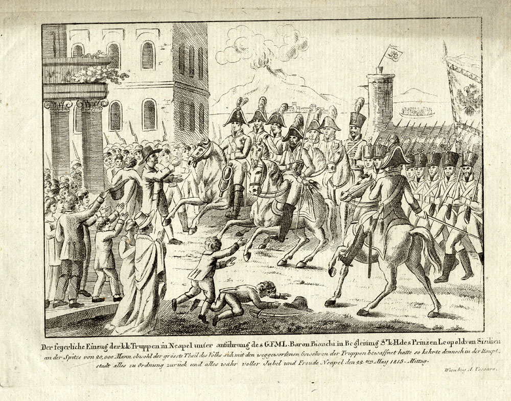 Einzug der k. k. Truppen in Neapel unter Feldmarschall Bianchi mit Leopold von Sizilien, Radierung, nach 1815